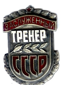 Знак к почётному спортивному званию «Заслуженный тренер СССР»